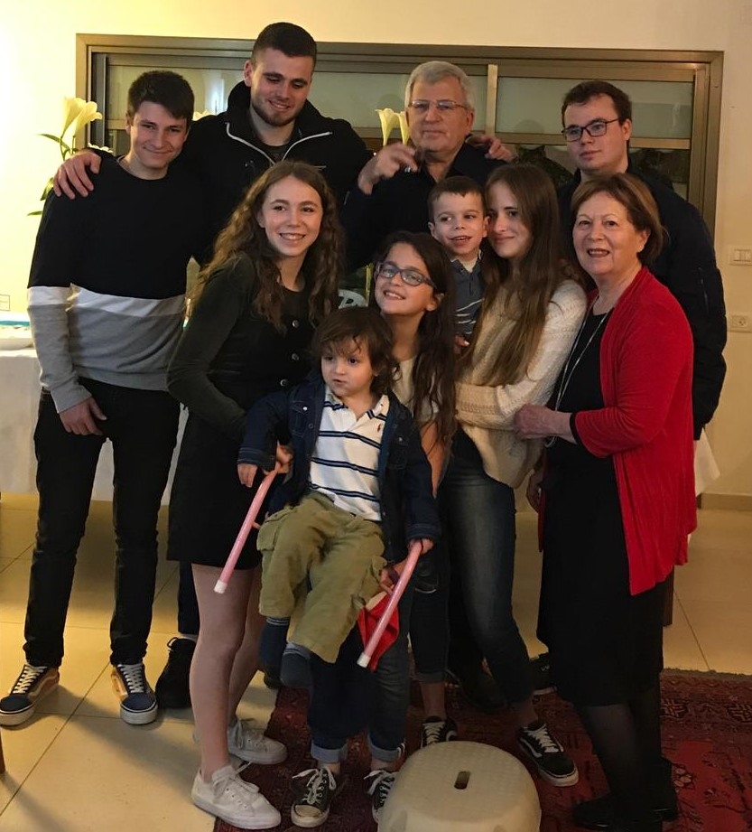 תמונה של גולדבורט עם נעמי והנכדים